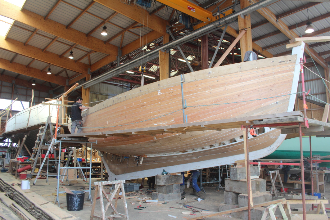 A l'intérieur du hangar se côtoient bateaux de plaisance bois et bateaux du patrimoine (ici, le Saint-Guénolé au premier plan).